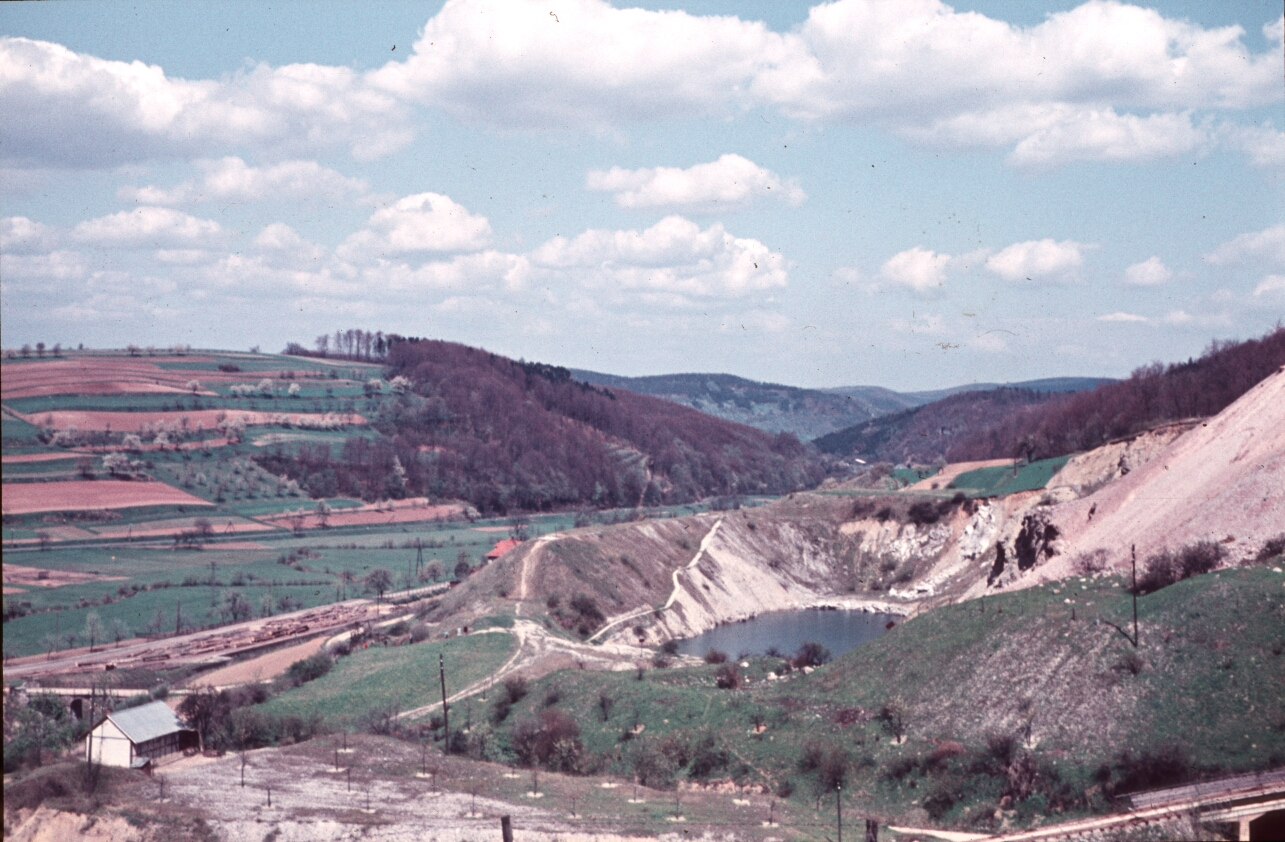 Der Grüne See am nord-östlichen Rand Hundelshausens im Sommer 1957